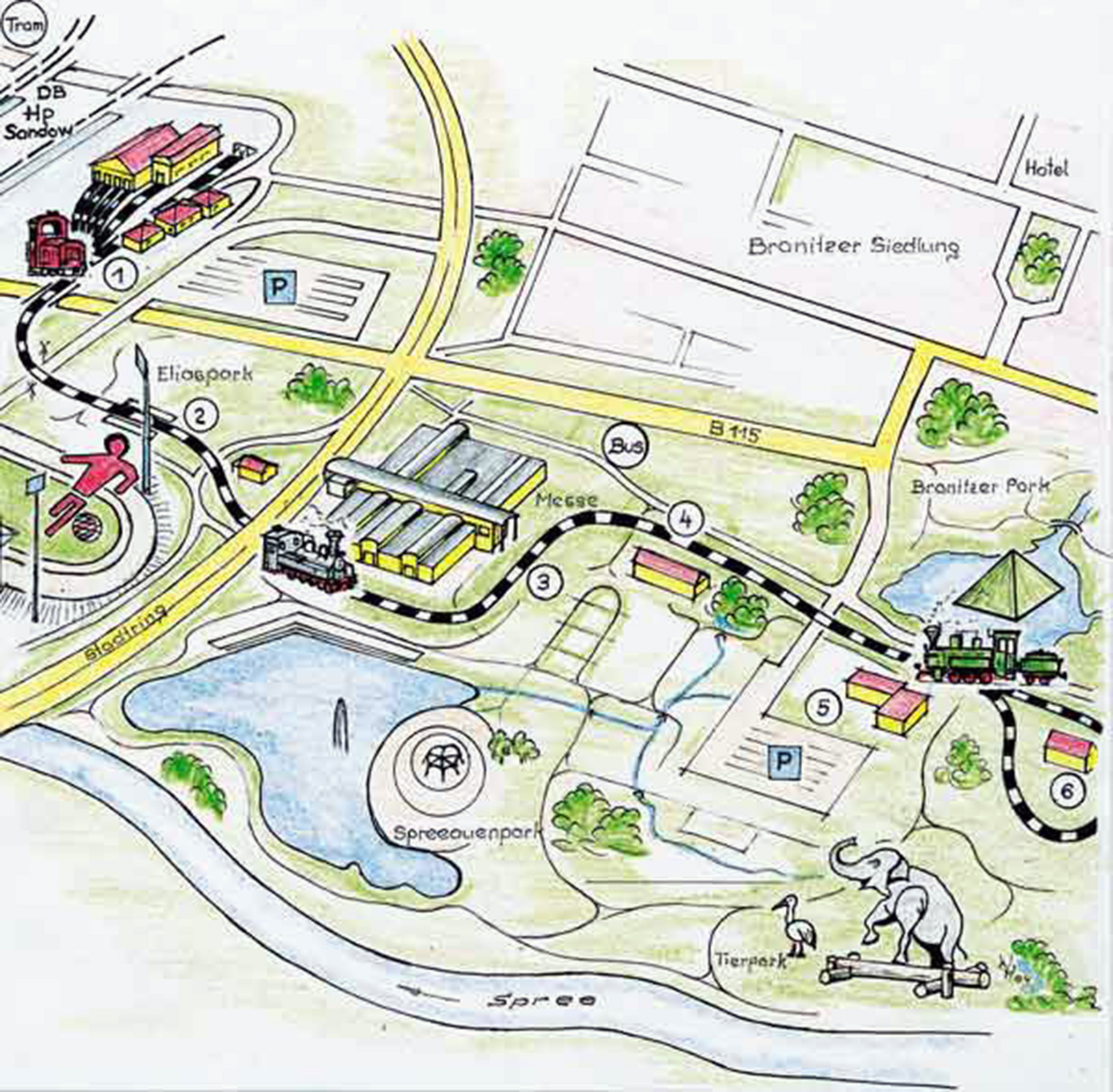 Karte Übersicht